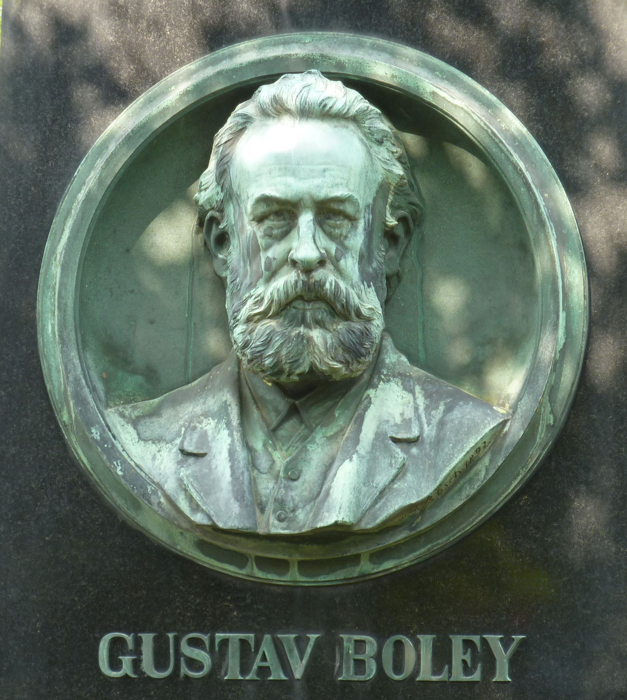 Grabmal von Gustav Boley, Detail. Porträt von Wilhelm Rösch. Vgl.